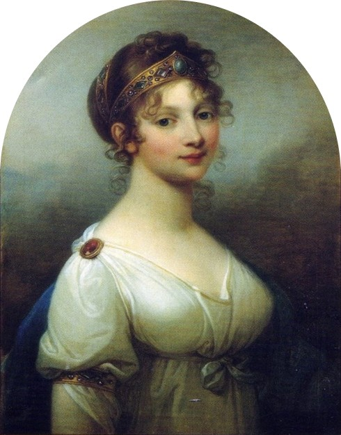 Porträt der Königin Luise von Preußen Queen Louise of Prussia